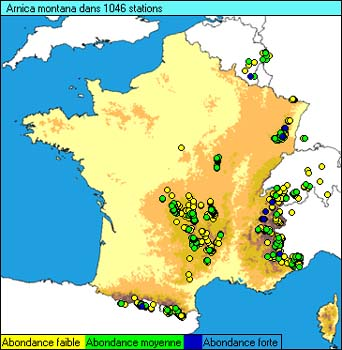 (en) Arnica montana, a map of France originating of the internet site The accord of the autor, H. Brisse, is here. (fr) Arnica des montagnes(Arnica montana), une carte de répartition de France issue du site internet L'accord de l'auteur, H. Brisse, se situe ici.